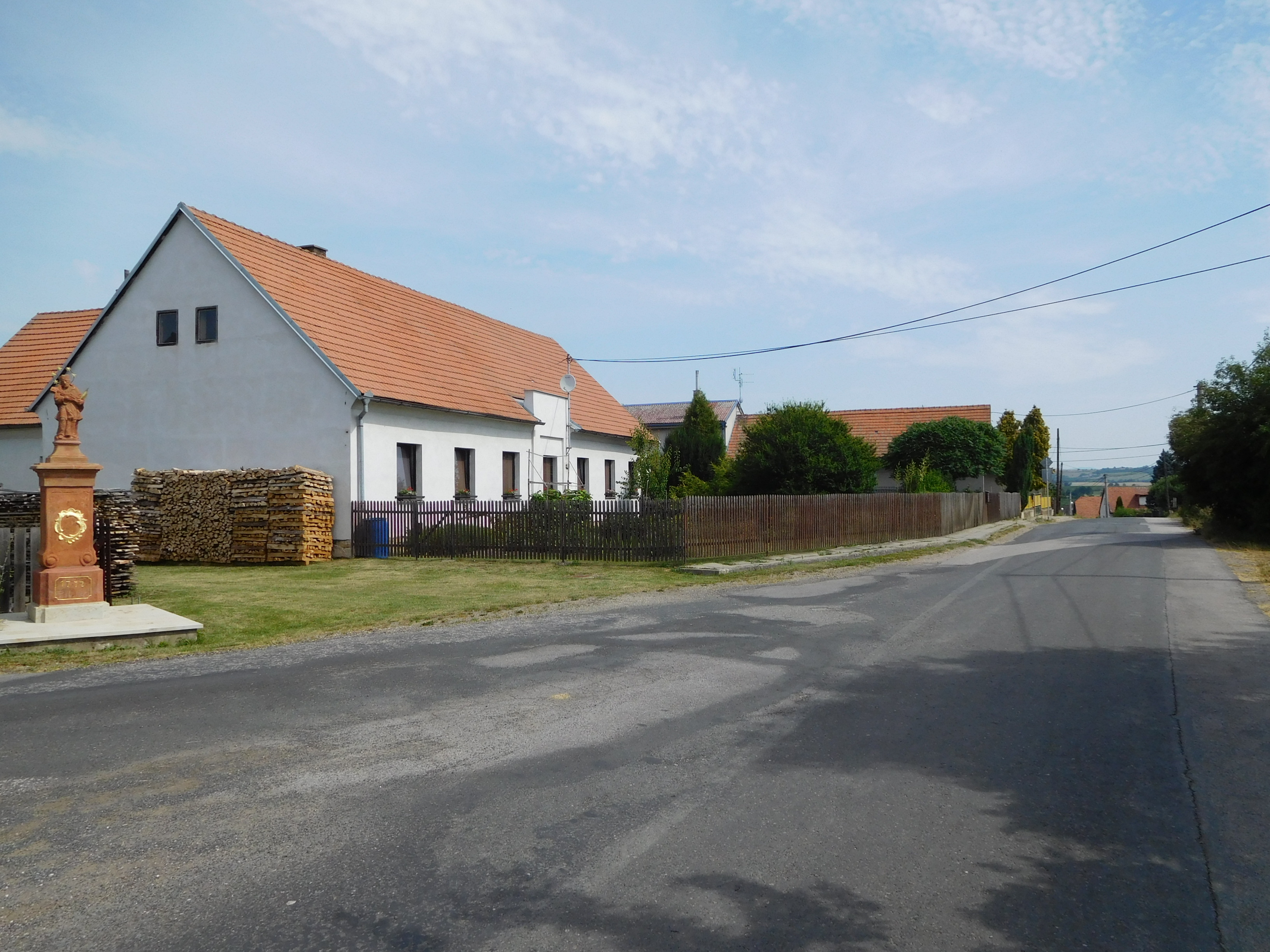 Brodek - náves